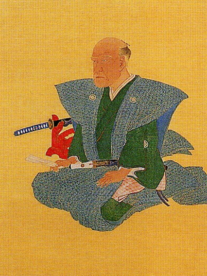 肥後佐賀藩藩儒・古賀穀堂の肖像画。